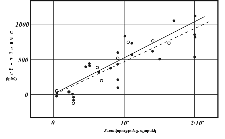 Հաբլի օրենքը ներկայացնող գրաֆիկ, հաբլի բաշխումը